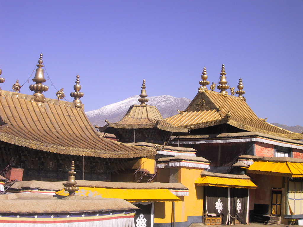 Potala-Gebäude - GNU-FDL - selbst fotografiert